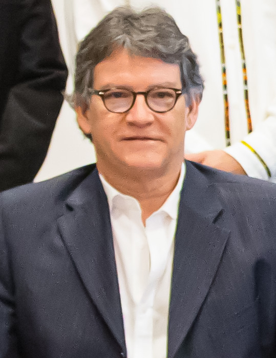 Gustavo Bell en el 5to ciclo de negociaciones de paz entre el ENL y el Gobierno de Colombia